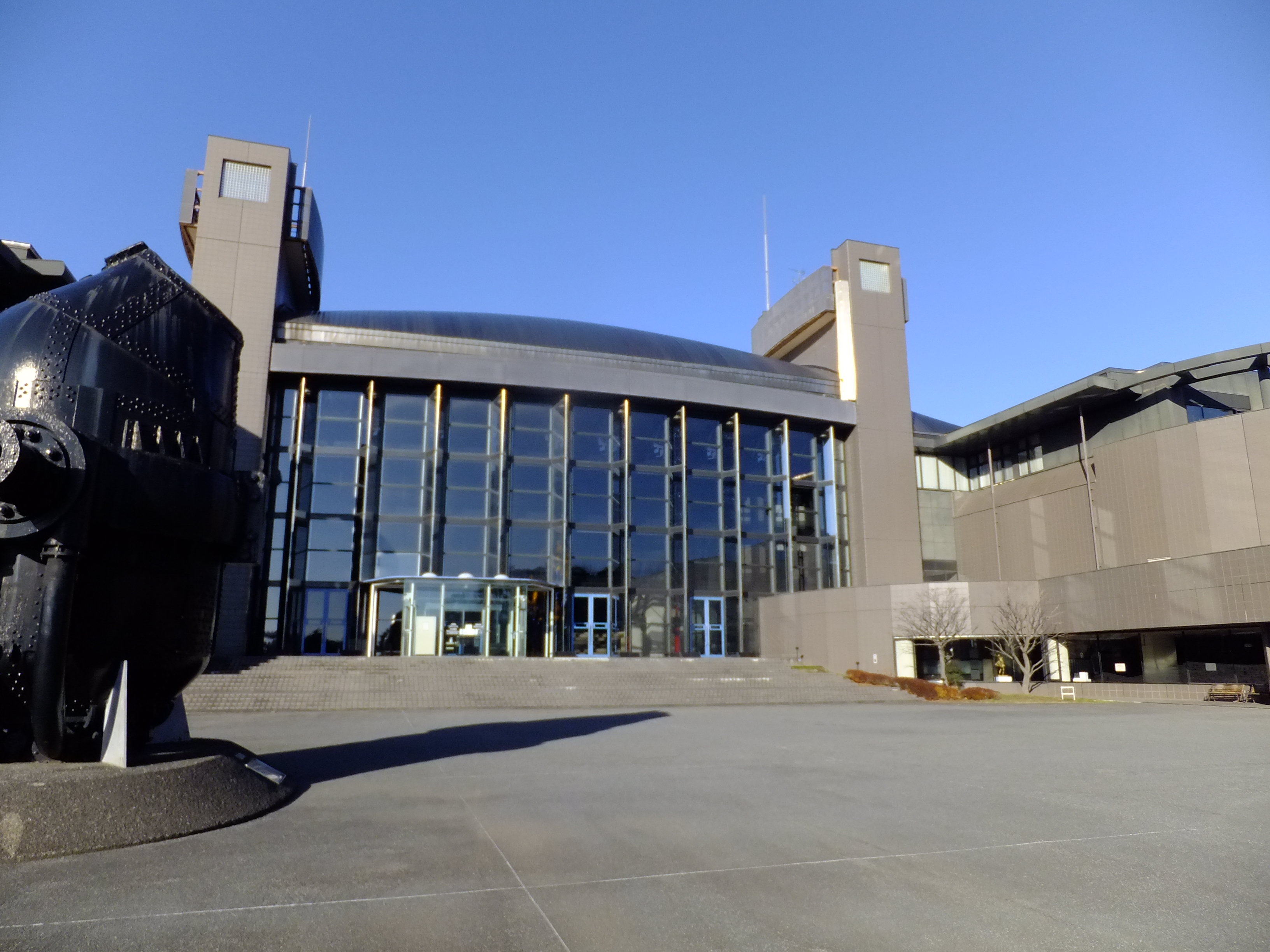 川崎市市民ミュージアム（川崎市中原区、等々力緑地内）